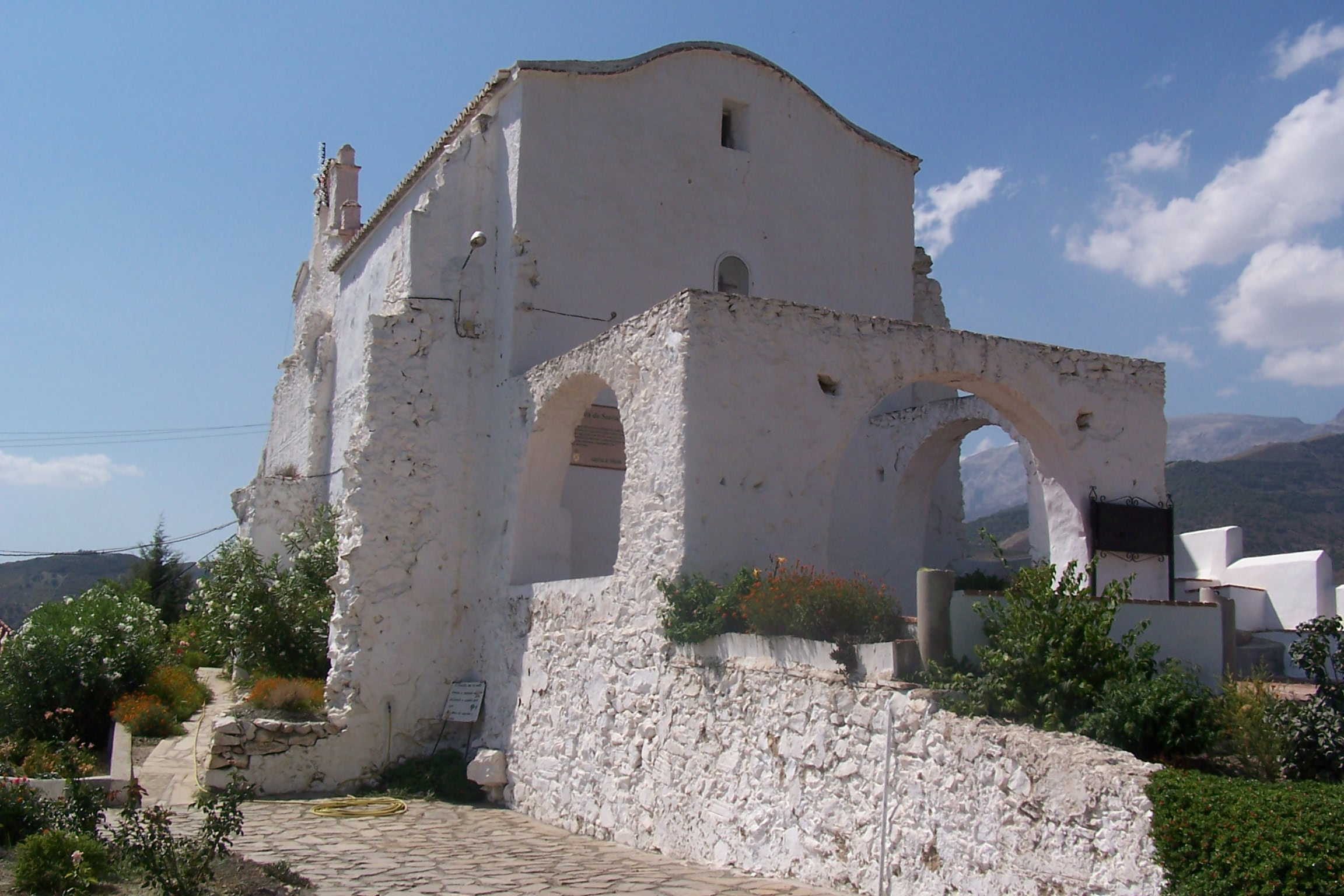 Henry Kelder